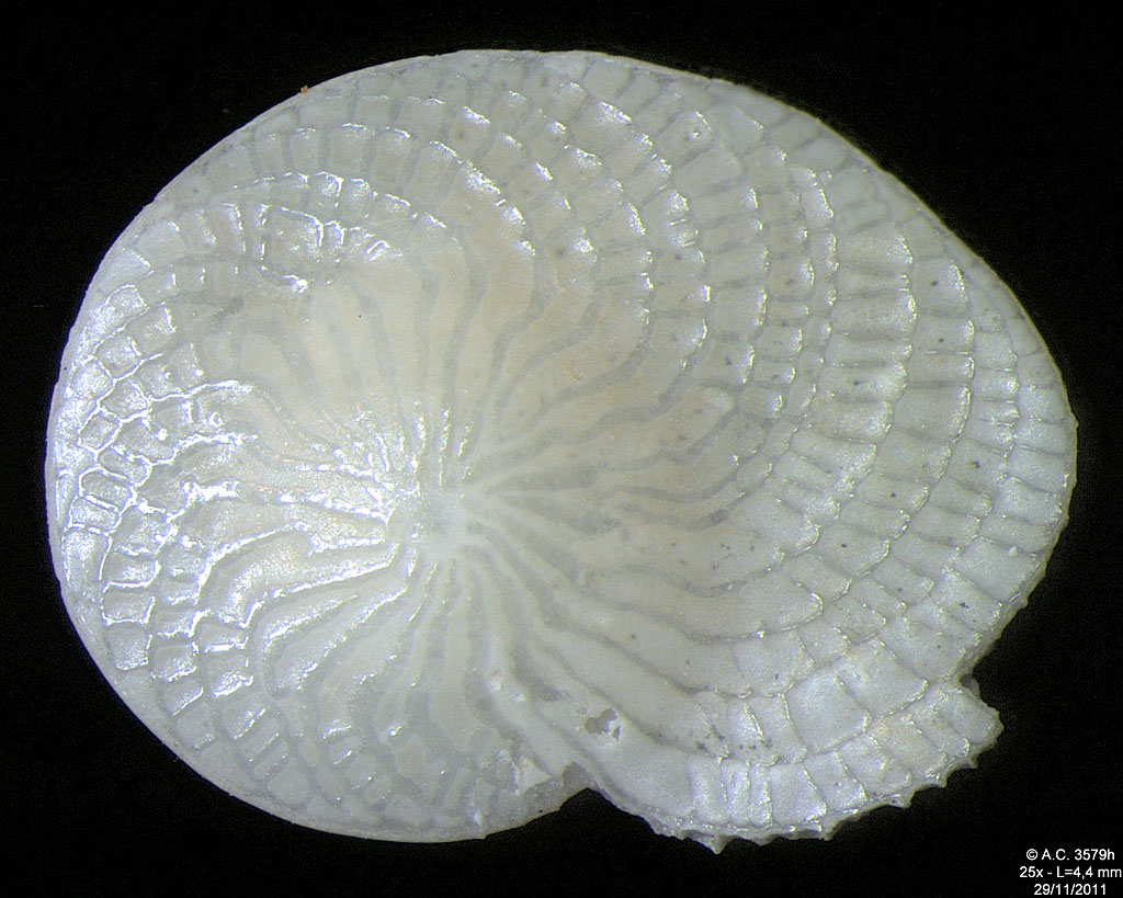 Foraminifère Heterostegina depressa (Indonésie)